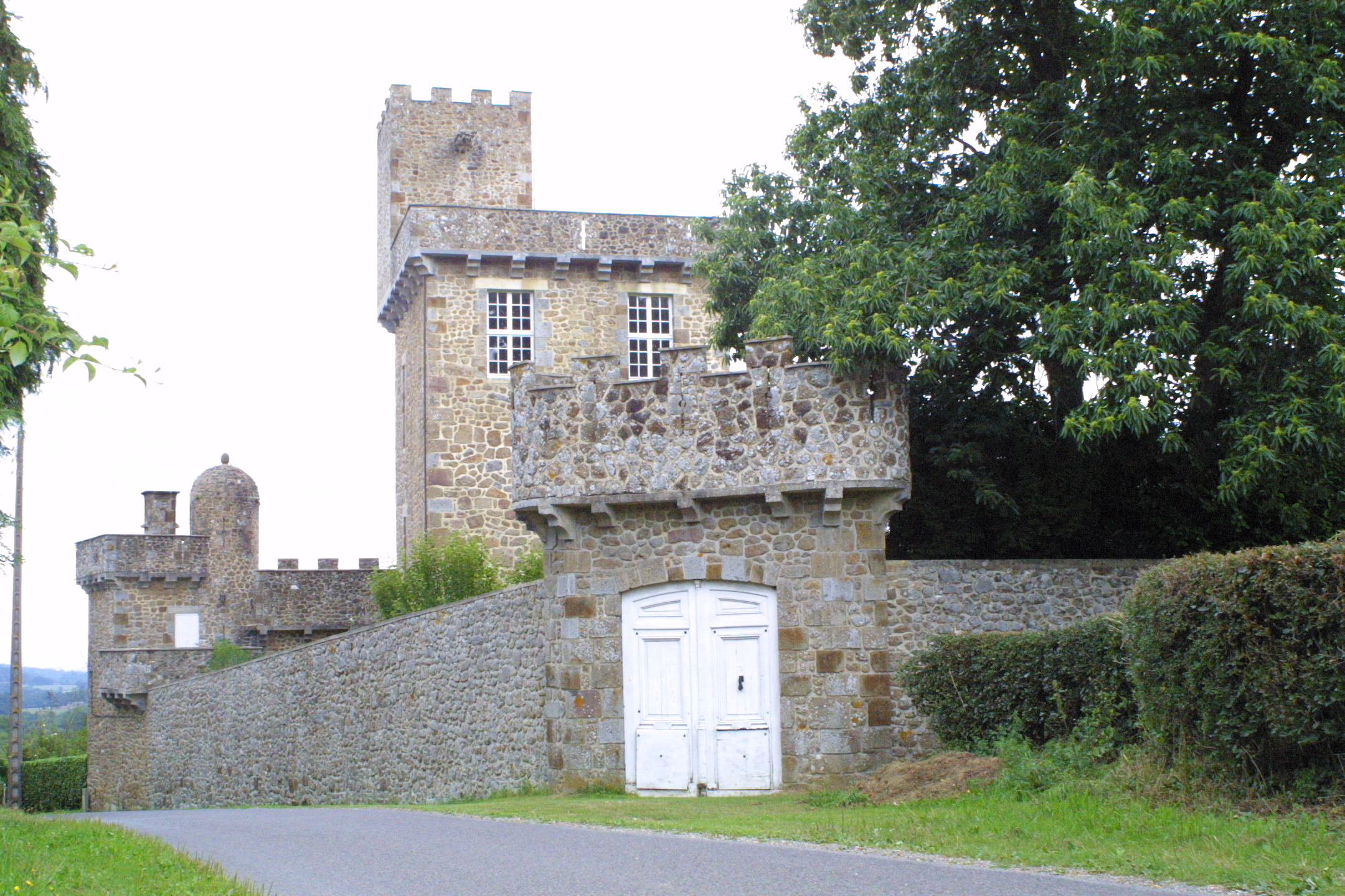 château de la Joasière à Sainte Honorine la Guillaume, Orne